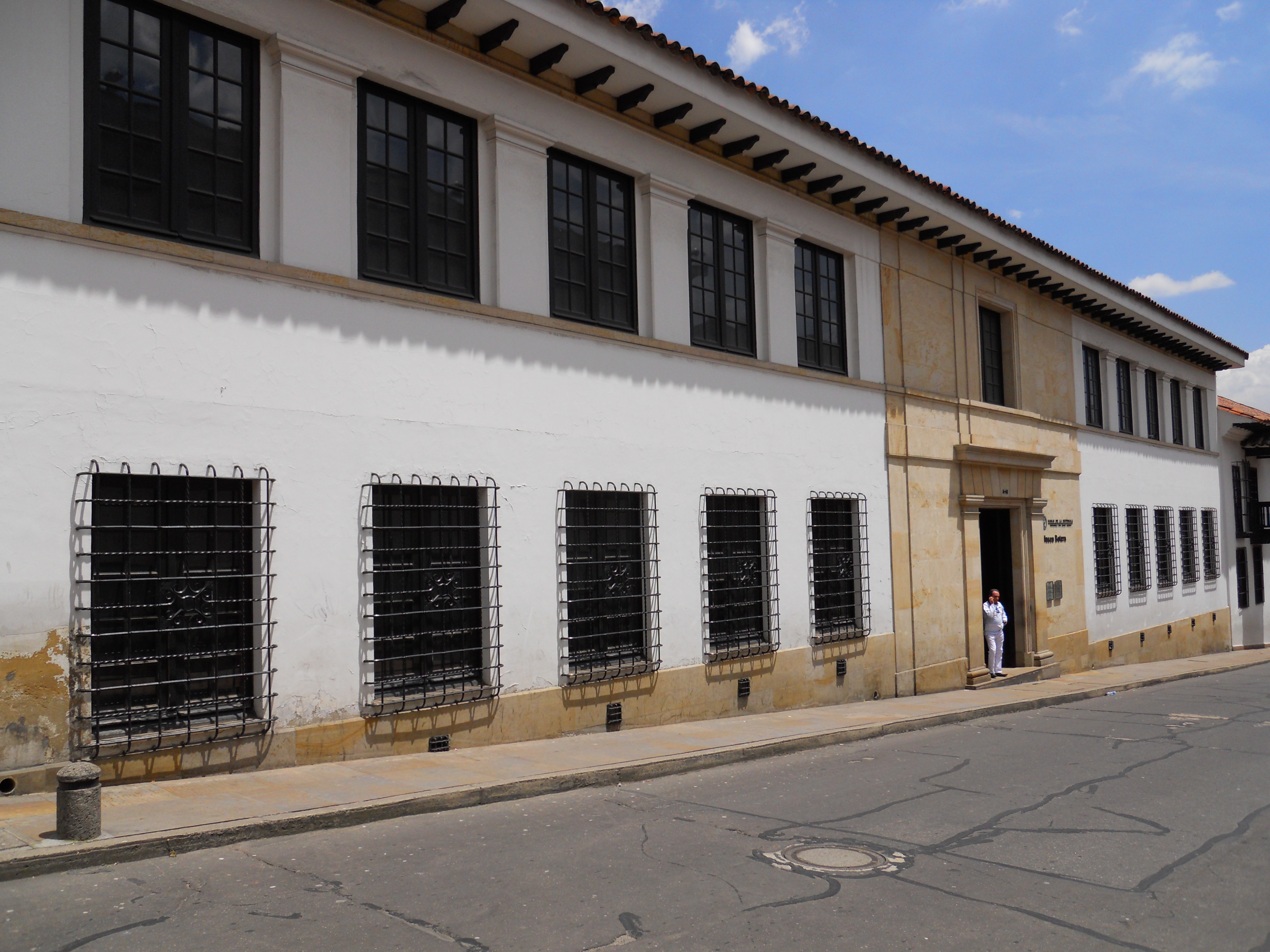 Fachada del Museo Botero, calle 11 entre carreras 4 y 5, centro de Bogota. Zona colonial.